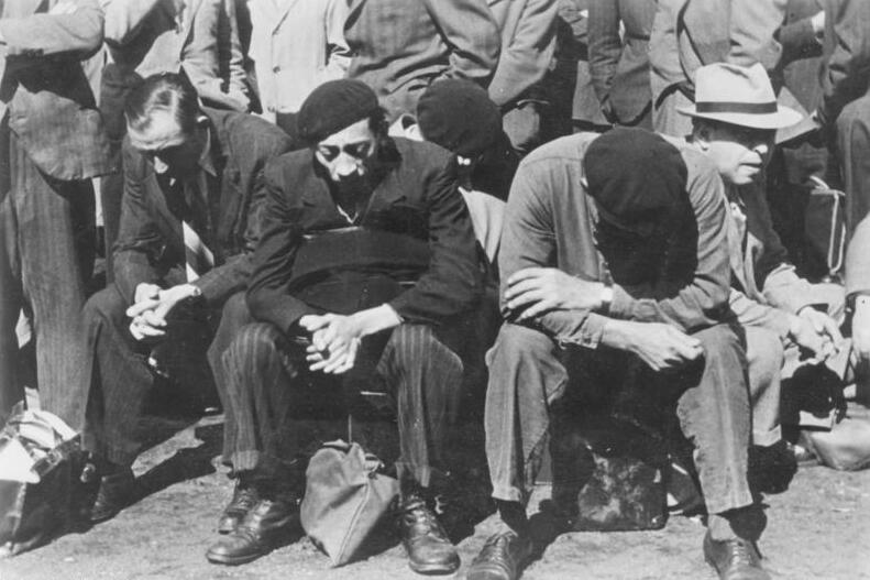 Zentralbild II. Weltkrieg 1939-45 Nach der Besetzung Frankreichs durch die faschistische deutsche Wehrmacht werden die nazistischen Rassengesetze auch hier praktiziert. Festnahme von Juden in Paris im August 1941. 8281-41